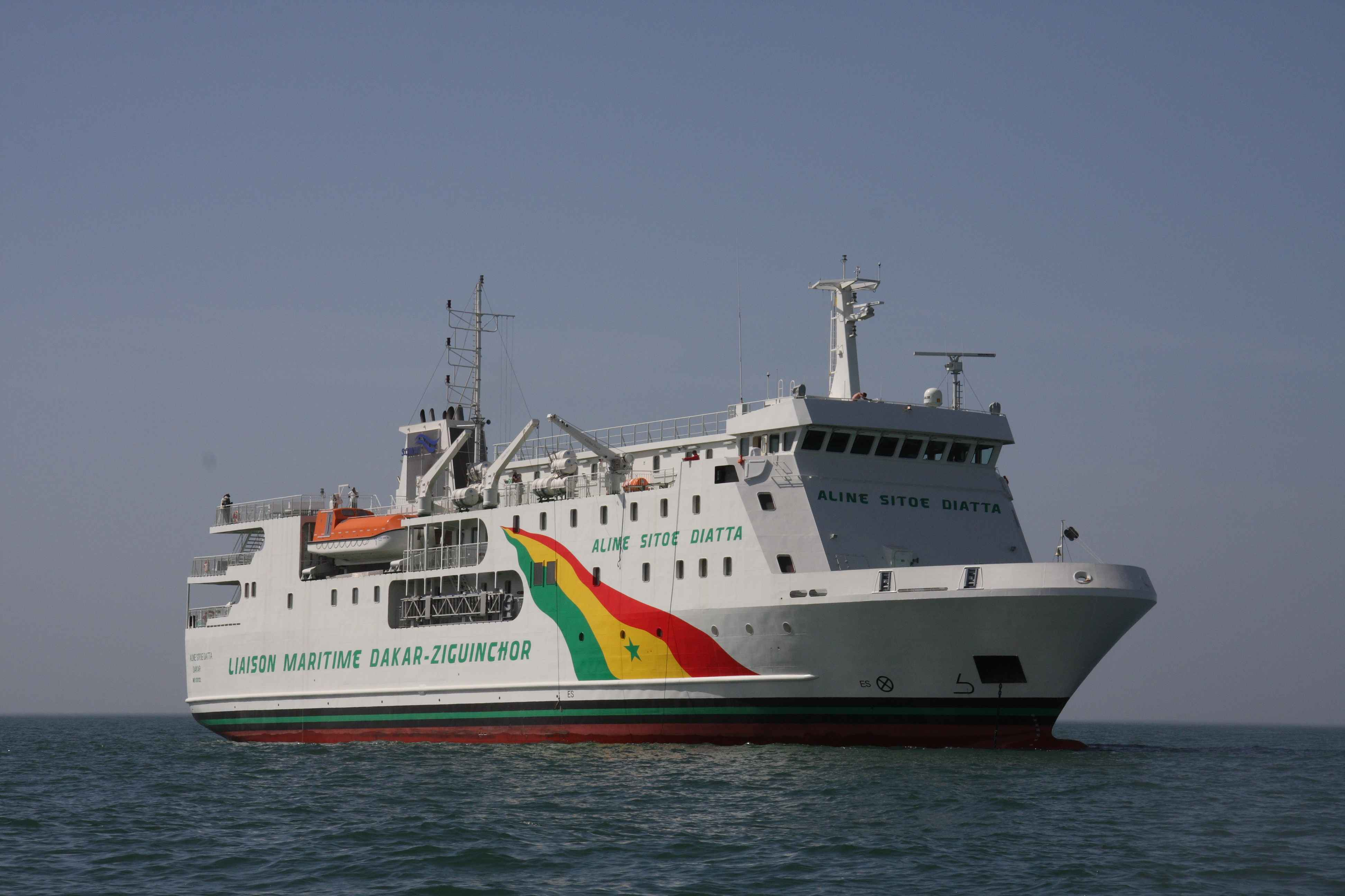 Aline Sitoé Diatta, Liaison Dakar-Ziguinchor depuis mois de mars 2008